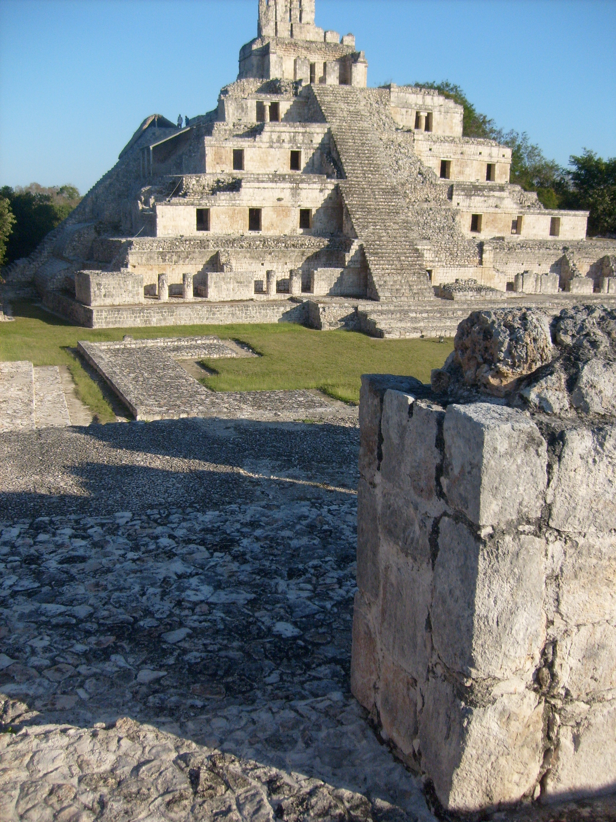 foto tomada en edzna